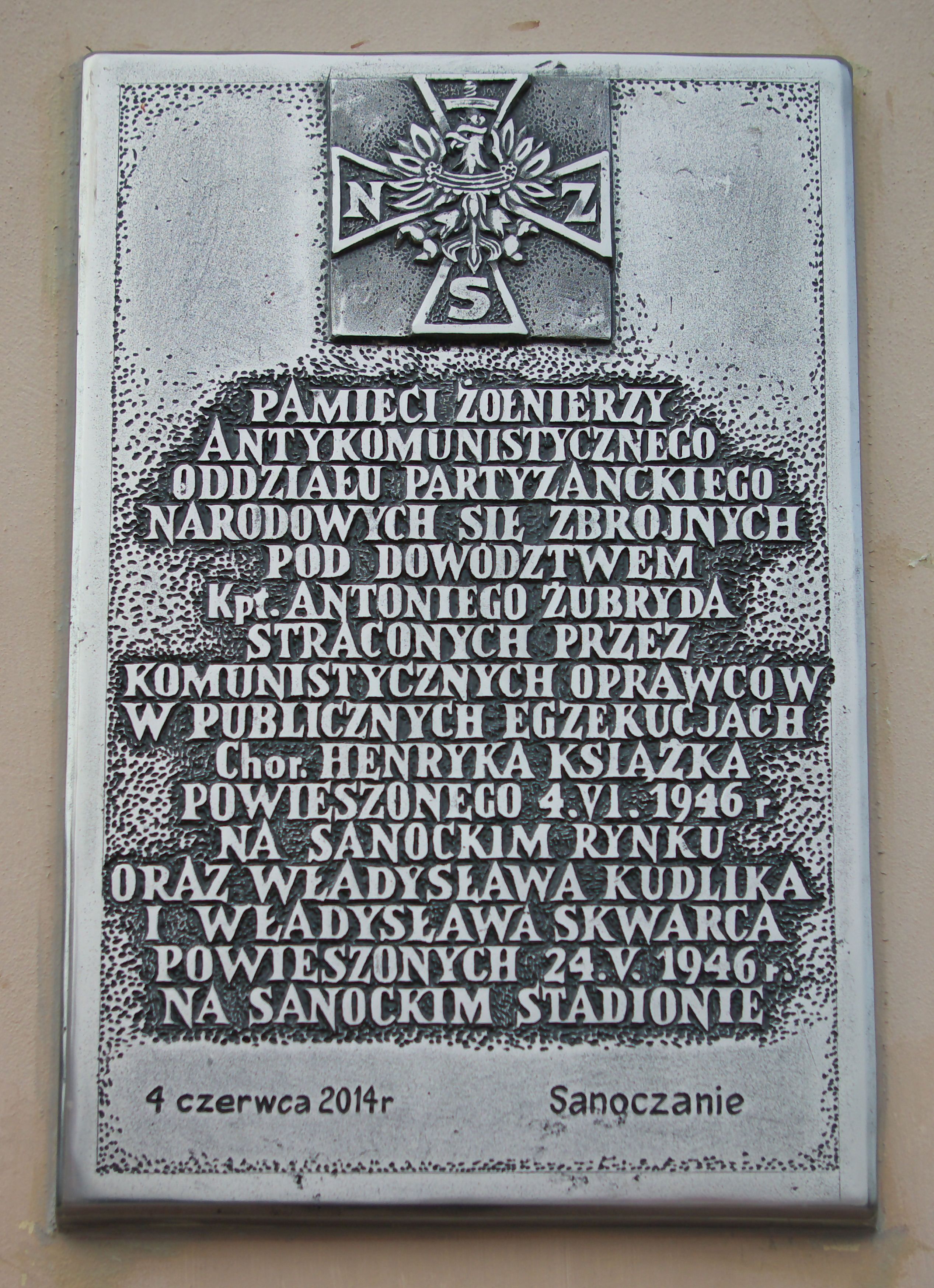 Tablica pamiątkowa odsłonięta 4 czerwca 2014 w Sanoku upamiętniająca trzech żołnierzy NSZ straconych w egzekucjach w mieście 24 maja i 4 czerwca 1946. Treść inskrypcji brzmi: "Pamięci żołnierzy antykomunistycznego oddziału partyzanckiego Narodowych Sił Zbrojnych pod dowództwem kpt. Antoniego Żubryda, straconych przez komunistycznych oprawców w publicznych egzekucjach: chor. Henryka Książka powieszonego 4.VI.1946 r. na sanockim rynku oraz Władysława Kudlika i Władysława Skwarca powieszonych 24.V.1946 r. na sanockim stadionie. 4 czerwca 2014 r. Sanoczanie". Tablica została umieszczona na kamienicy przy ulicy Rynek 20 przylegającej do kościoła Franciszkanów w Sanoku.